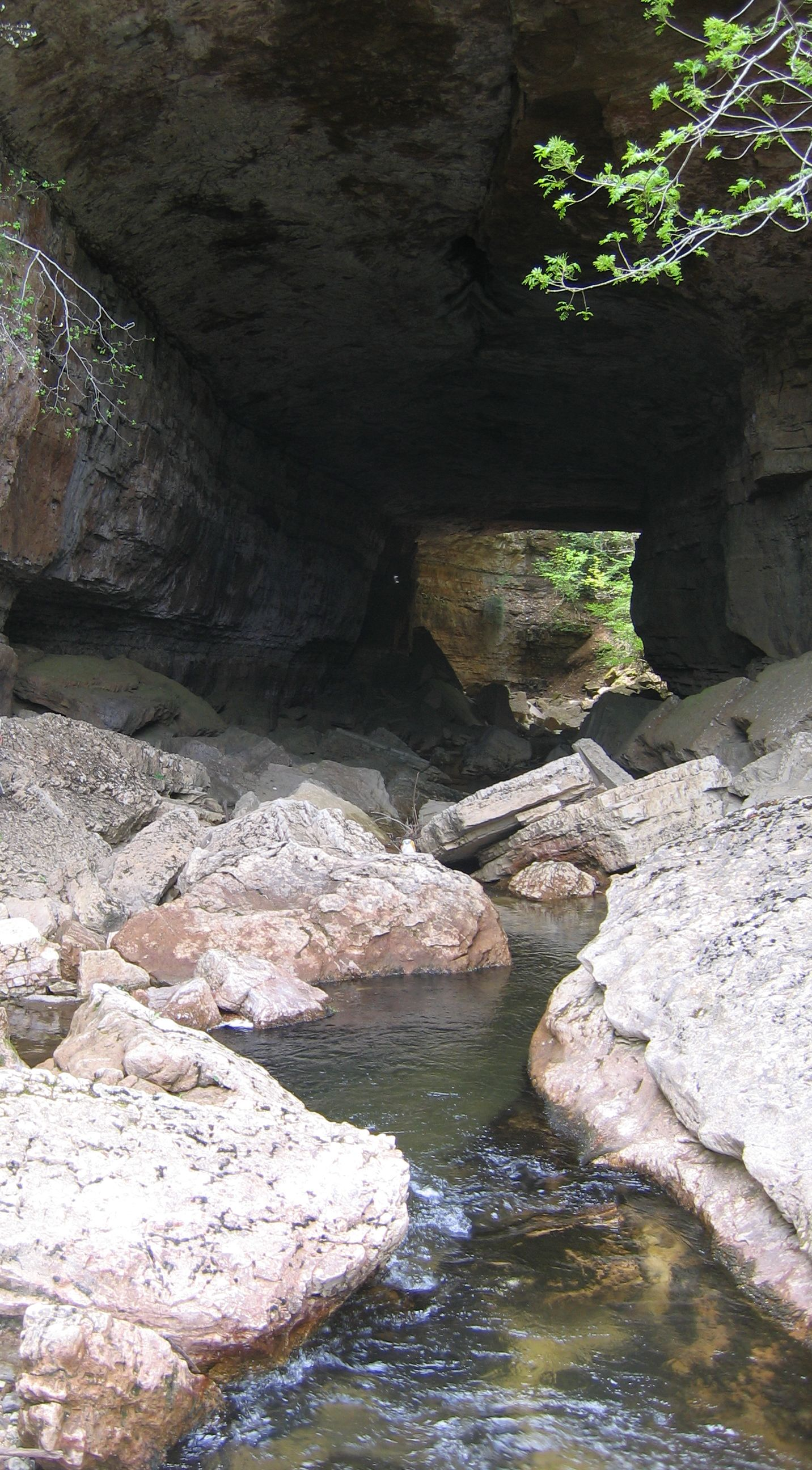 Perte du Bonheur, rivière qui prend le nom de Bramabiau à sa résurgence, Gard, France. Source: Hugo Soria Licence: GFDL Hugo Soria